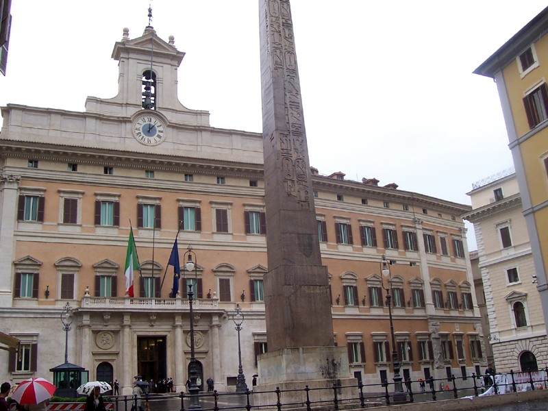 Roma - Palazzo di Montecitorio